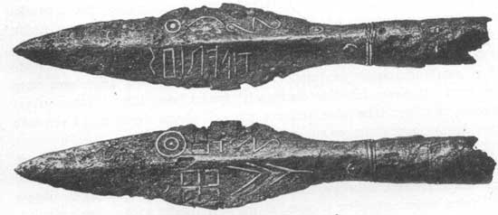 Надпись на копье из Ковеля (Западная Украина). Образец ранней рунической надписи (IV в.), написанной бустрофедоном. Надпись гласит: Tilarids, что значит «целеустремлённый» (руническая надпись. Дэвид Дирингер, "Алфавит")